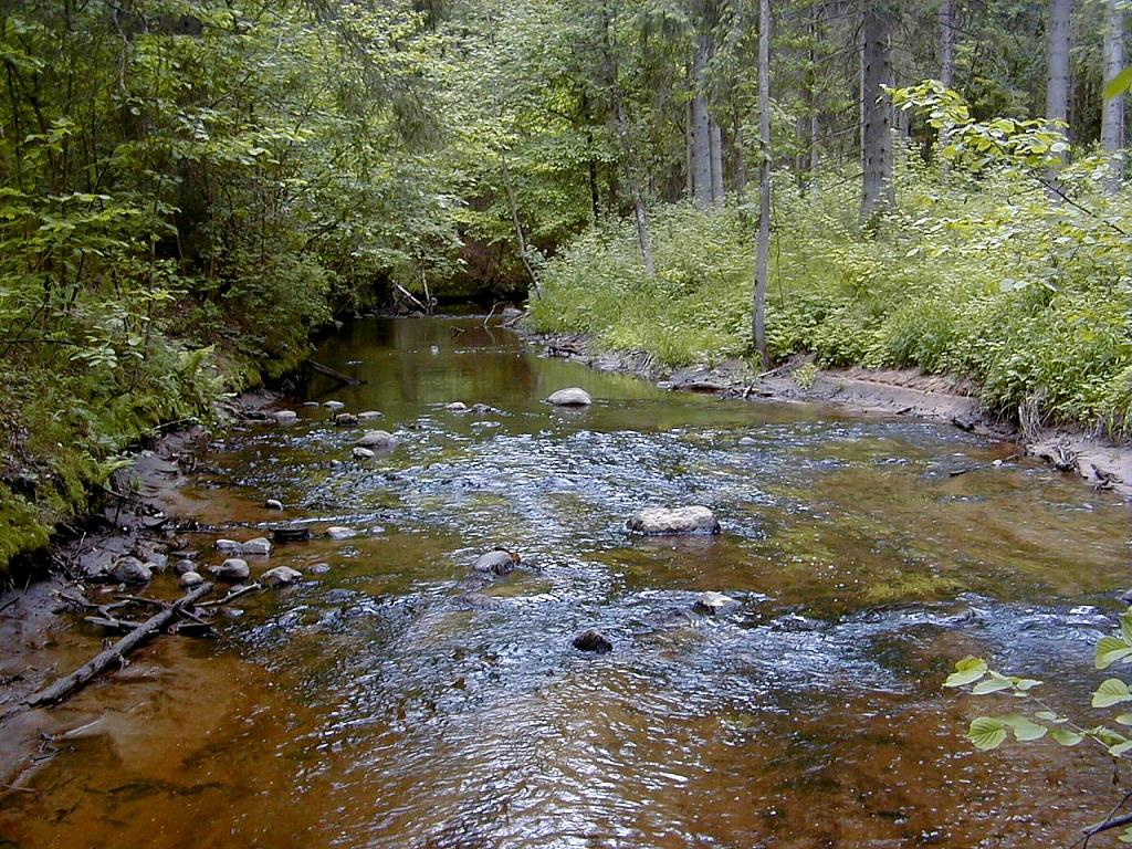 Loja pie Murjāņiem 2002-05-25